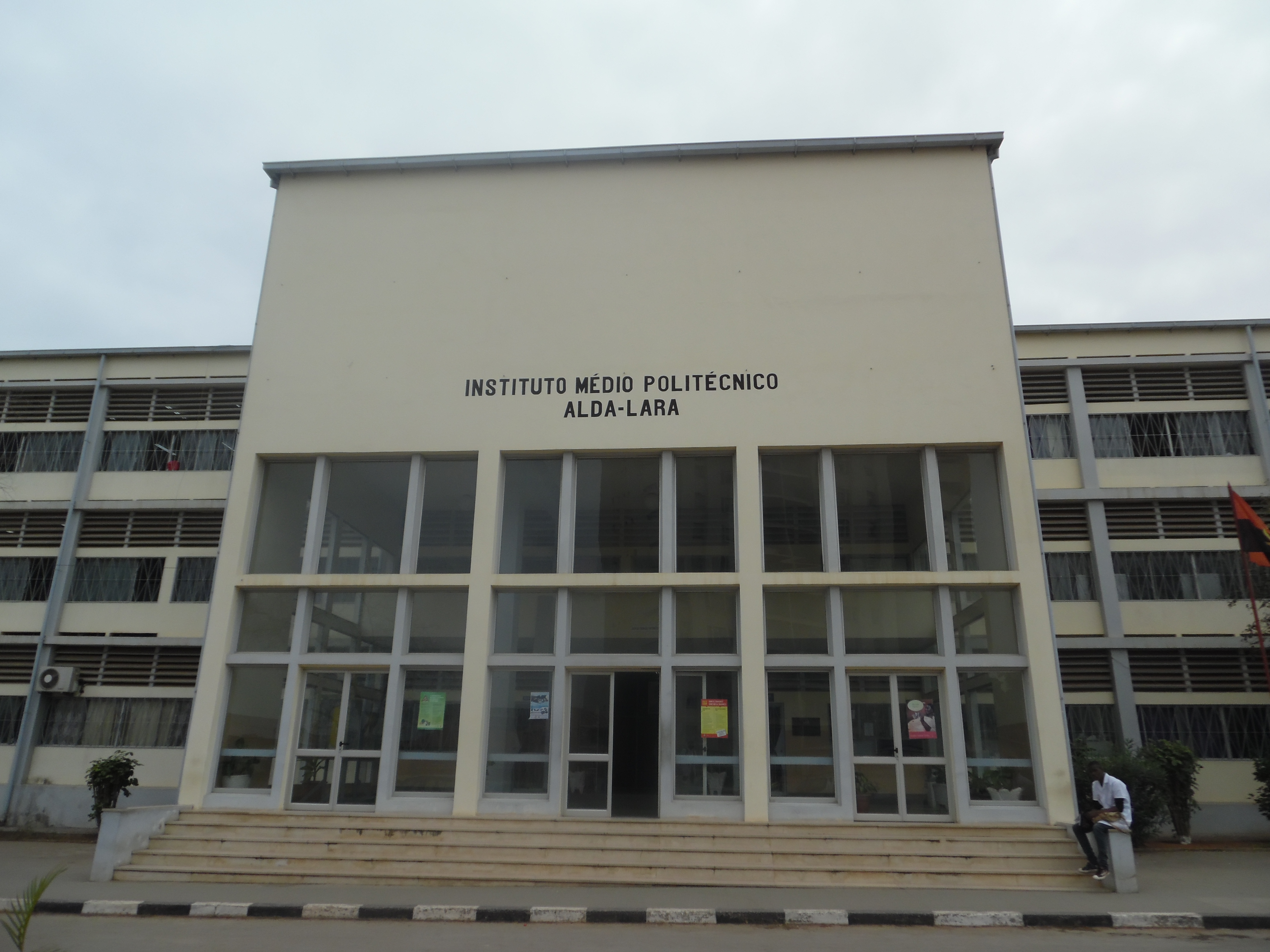 O Instituto Médio Politécnico Alda Lara ou IMPAL